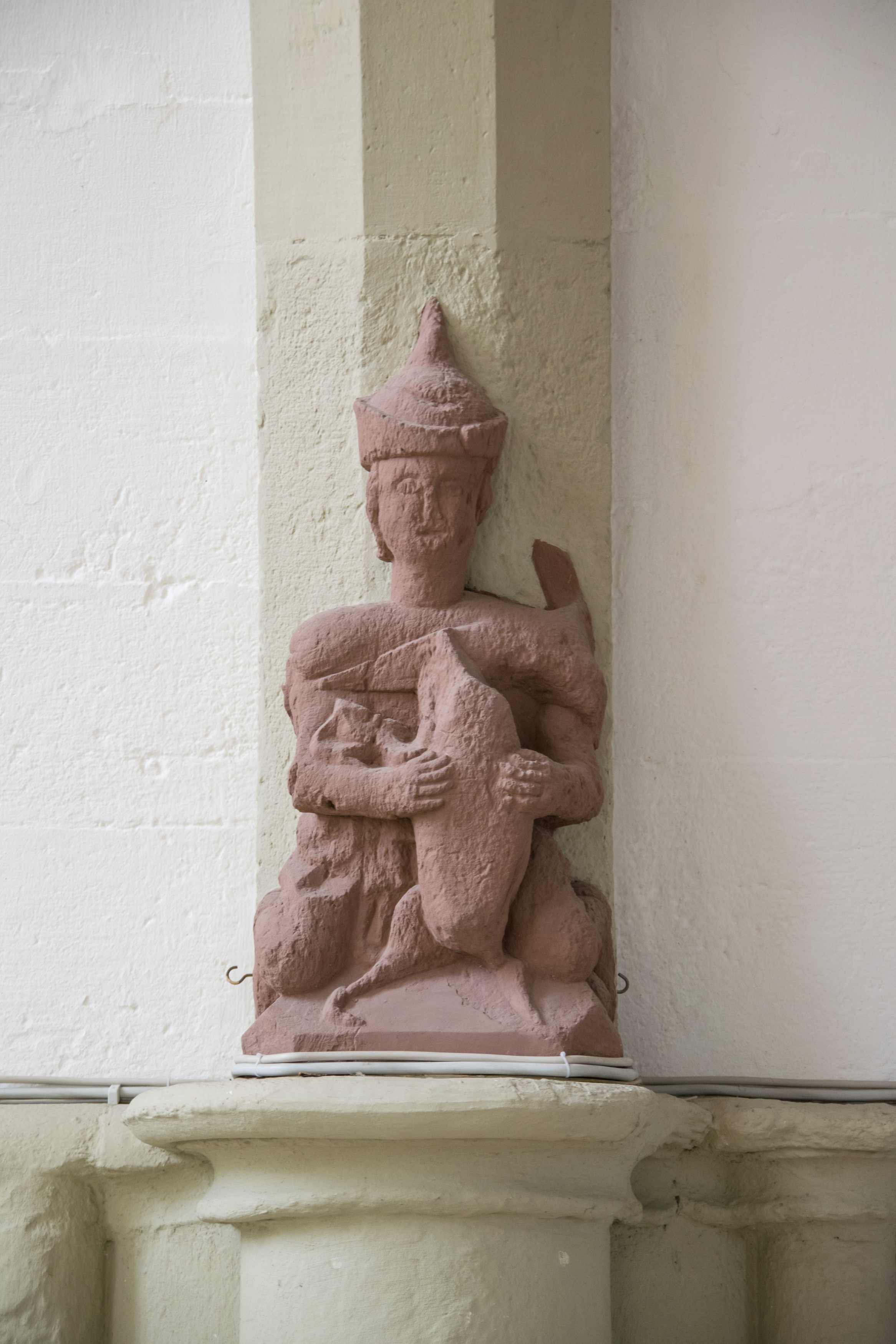 Evangelisch-lutherische Kirche St. Marien, Lemgo; sogenannte "Judensau" aus der Bauzeit um 1310